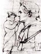 Схематичный рисунок живописца М. Т. Маркова: скульптор Орловский Б. И. в мастерской ваятеля Б. Торвальдсена (Рим)